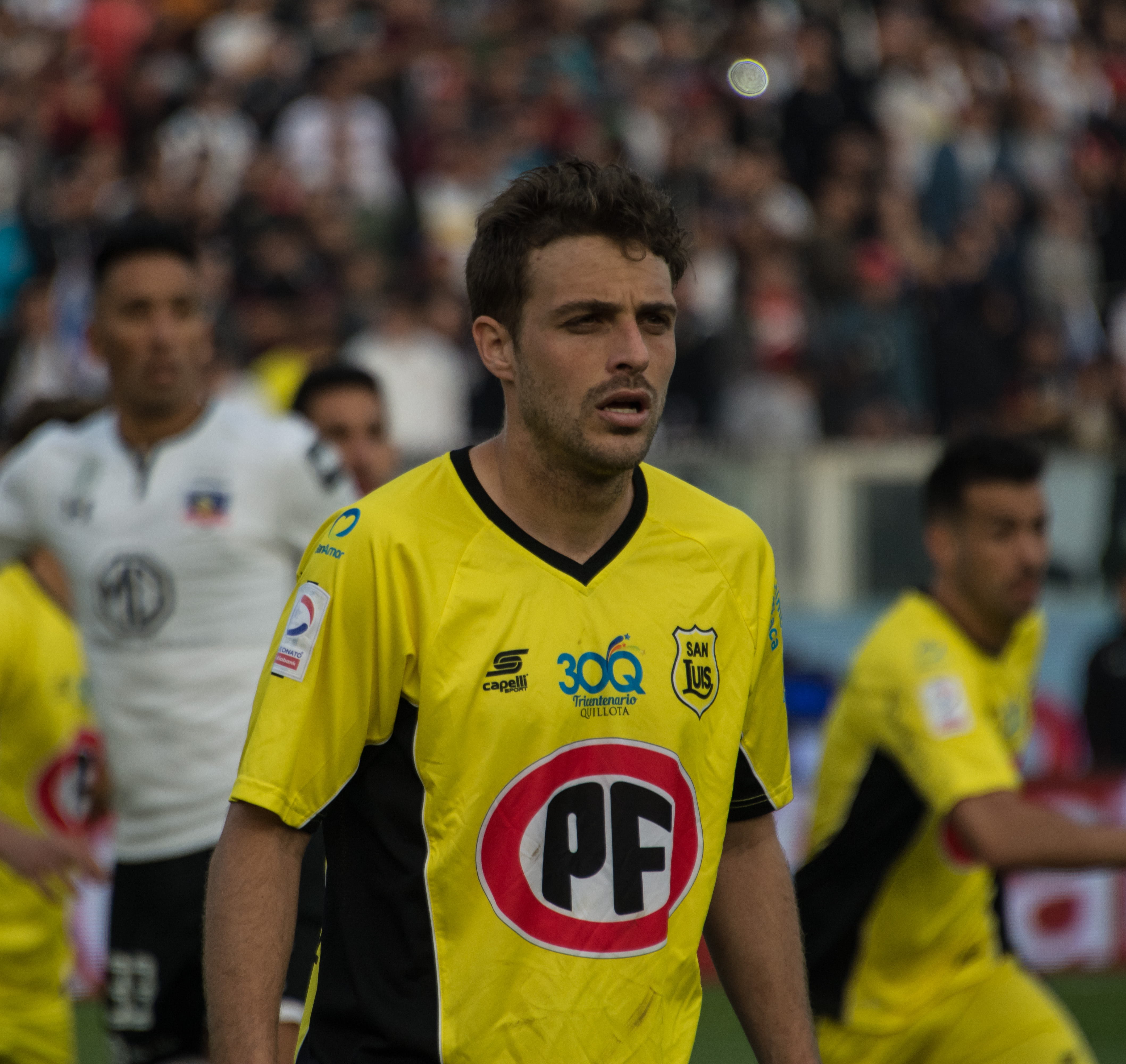 Maximiliano Rodríguez, Colo-Colo v San Luis, Estadio Monumental, Macul, Santiago, Chile.